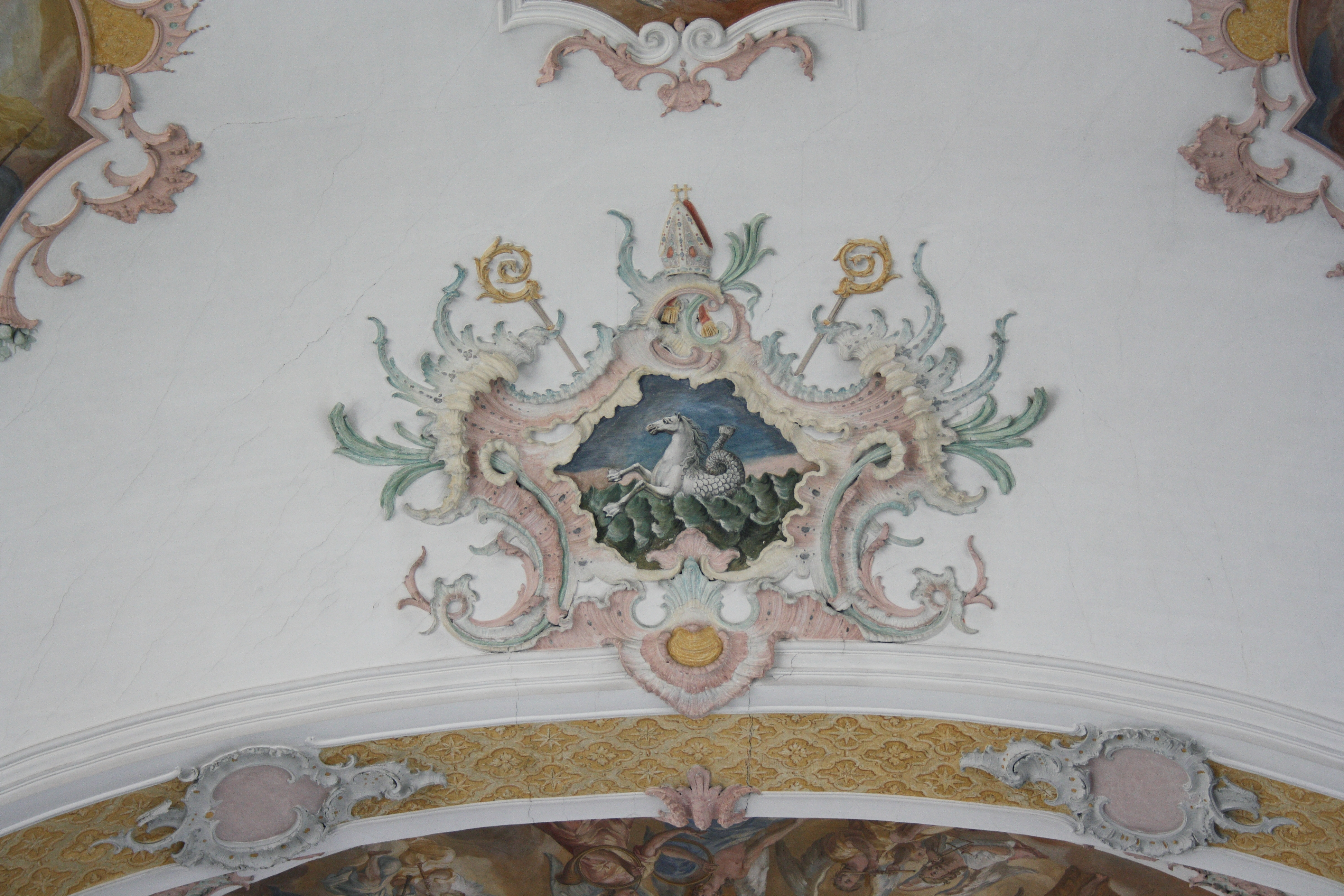 Katholische Pfarrkirche St. Peter in Tapfheim im Landkreis Dillingen an der Donau (Bayern), Wappen des Abtes Cölestin I. Meermoos (Seepferd) in Stuckkartusche am Chorbogen